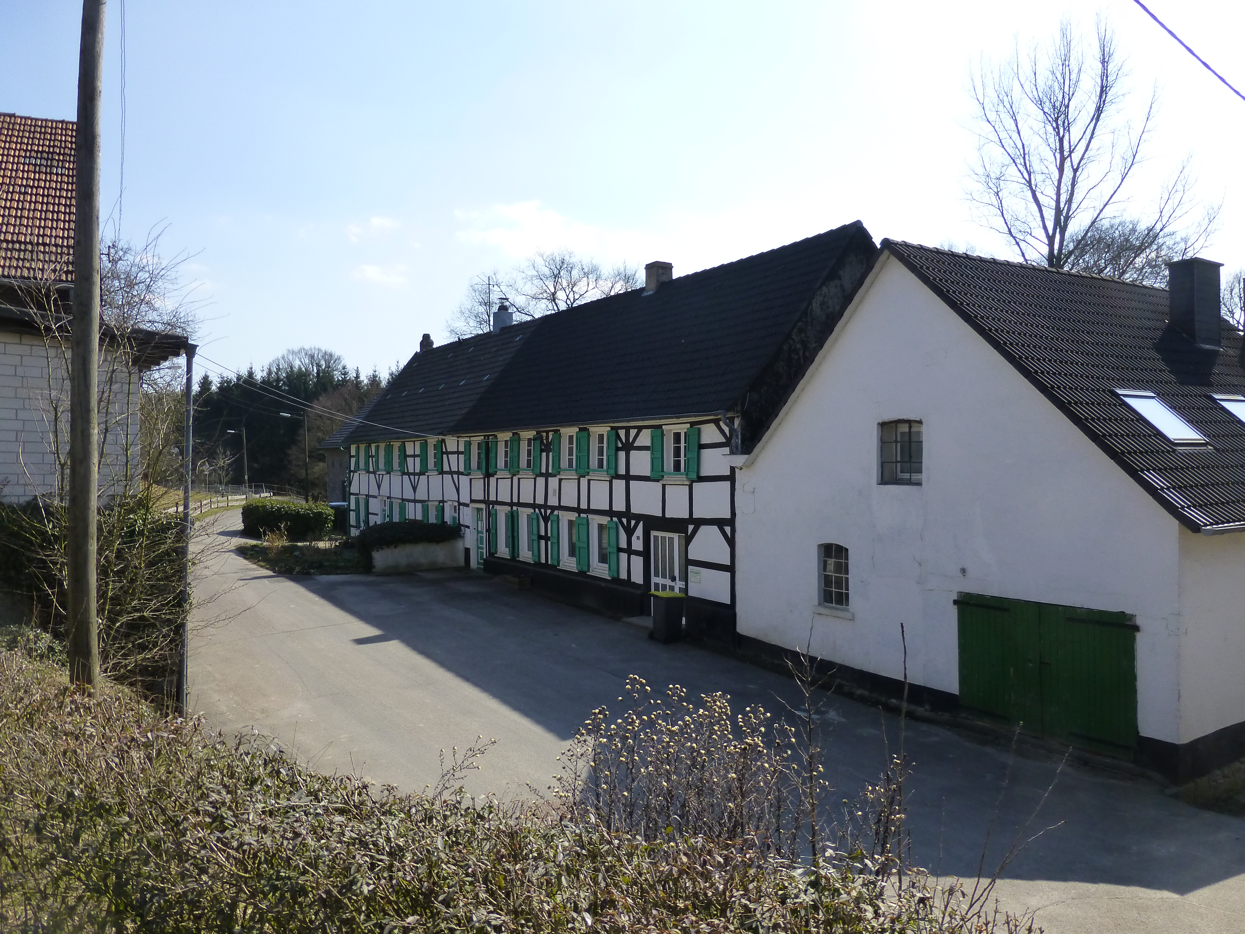 Schlehenweg, Wuppertal